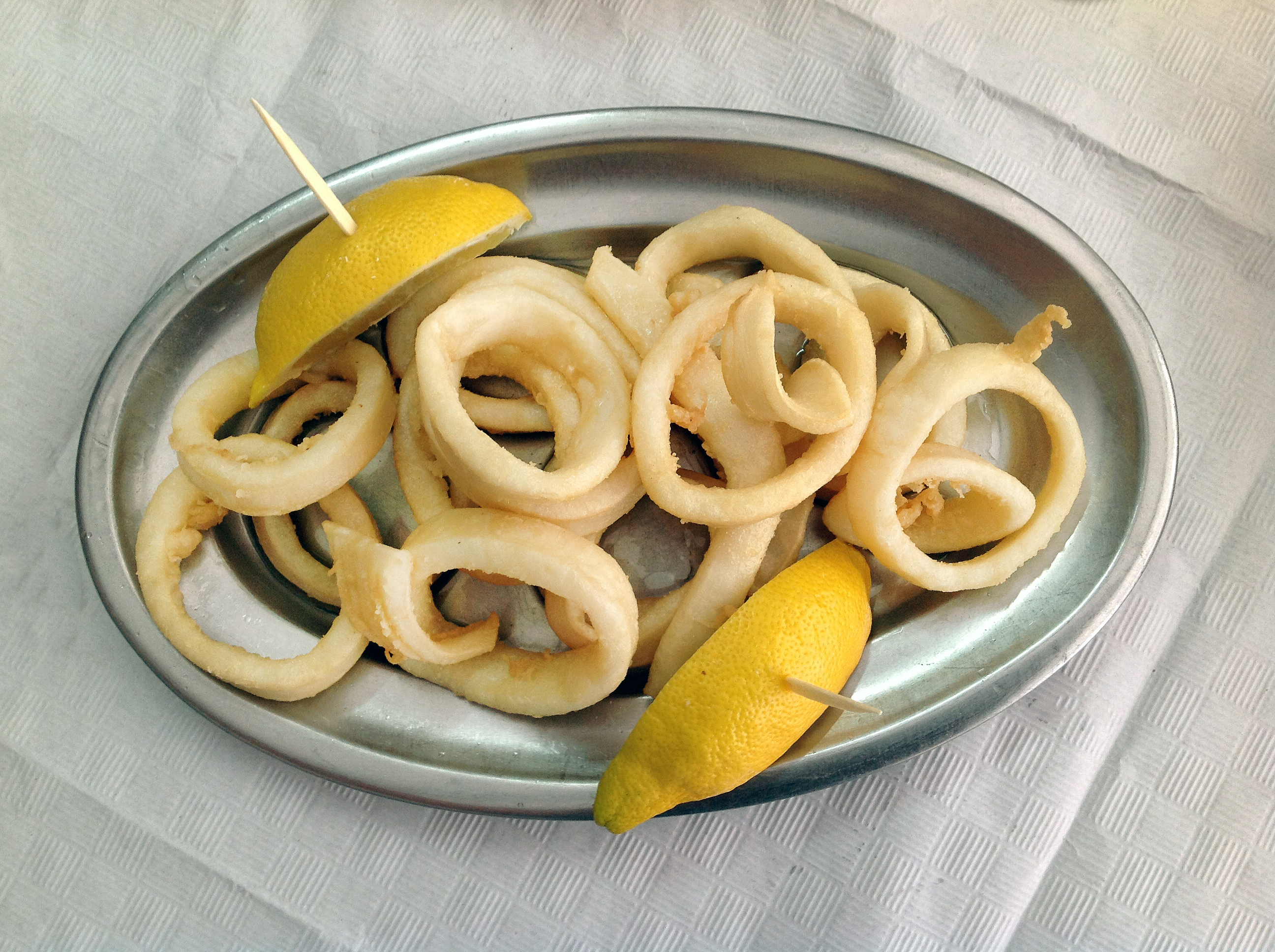 Calamares fritos o a la romana